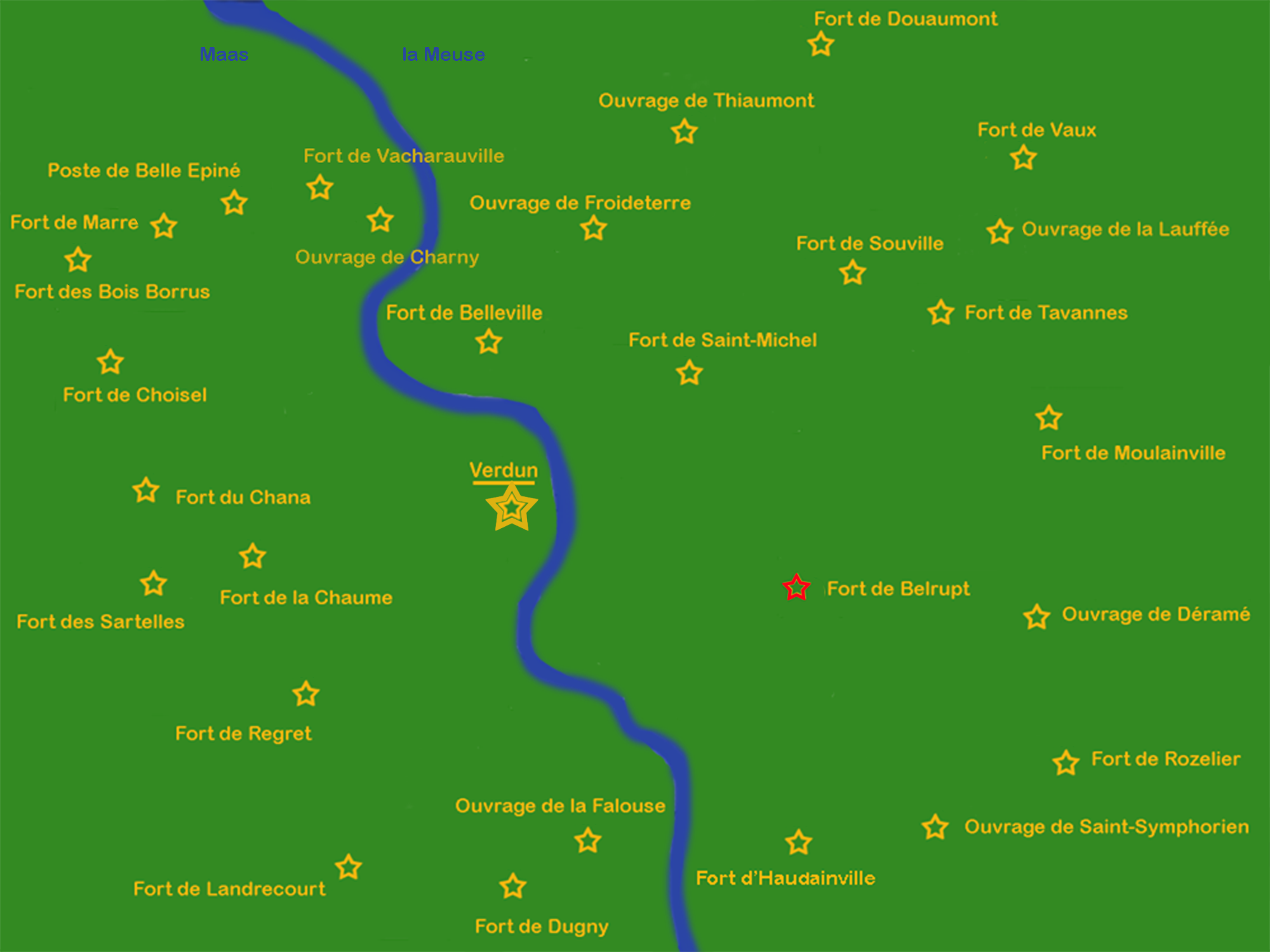 Lageplan